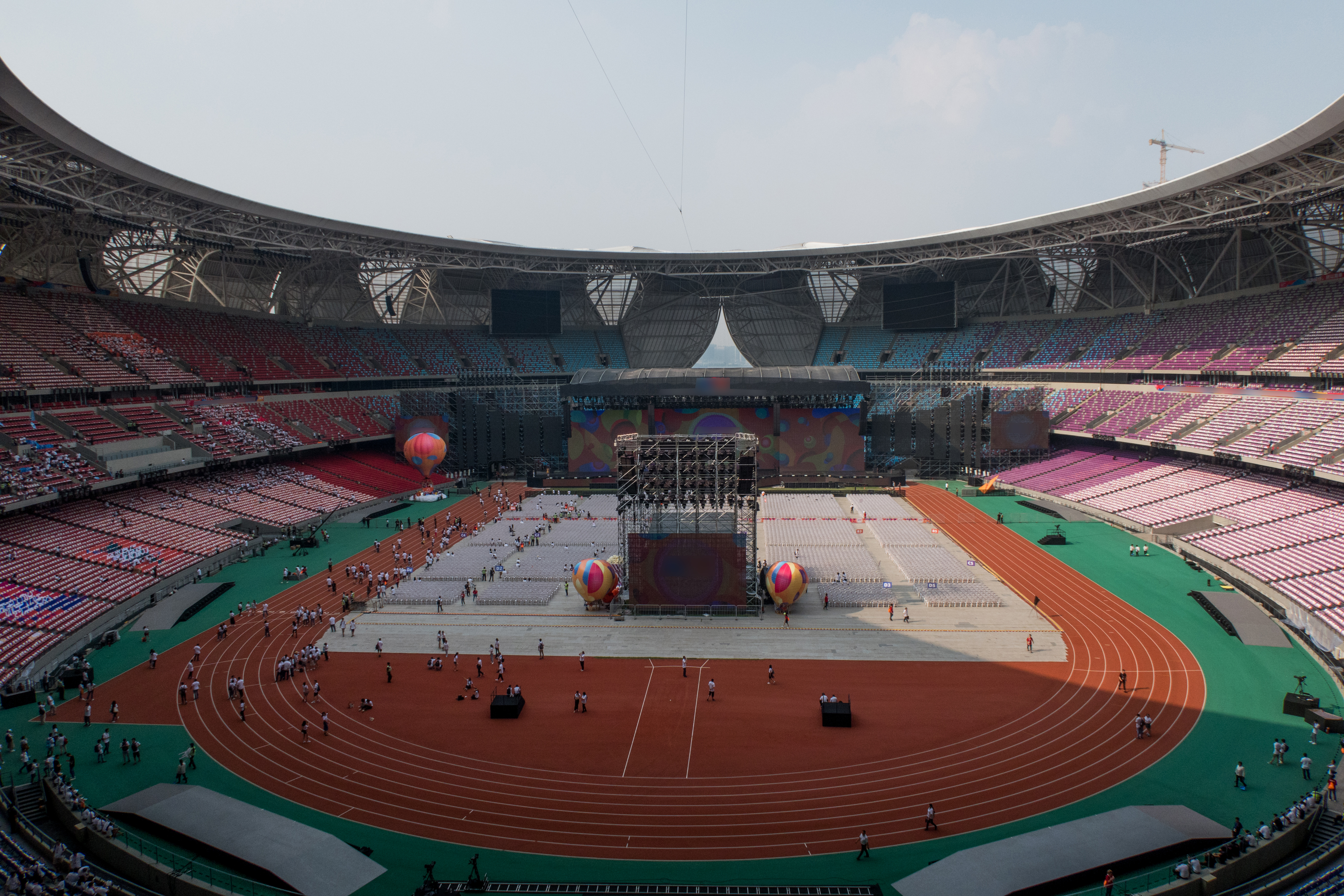 杭州奥体中心主体育场